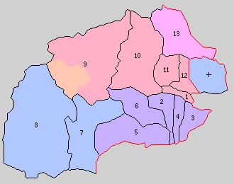 群馬県吾妻郡の町村。